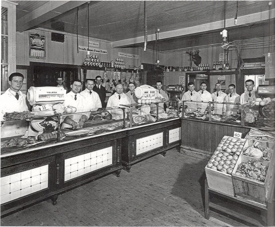 La boucherie Lafleur de la 5e Rue de Limoilou vers 1930 « Tous les comptoirs de boucherie des épiceries du Québec offrent la saucisse Lafleur. Tout le monde la connaît, mais moins de gens savent que cette charcuterie est née dans le quartier Limoilou à Québec. C’est en 1912 qu’Alphonse Lafleur ouvre une boucherie sur la 5e Rue du quartier Limoilou. Rapidement, il développe des spécialités de saucisses et de charcuteries. Face au succès de sa petite entreprise, il agrandit sa boucherie en acquérant les lots voisins de son commerce. Sa réputation s’étend désormais à toute la ville de Québec. Il achète des camions et se lance dans le commerce en gros. À la suite de son décès survenu en 1934, ses fils Raymond et Gérard prennent la relève et relance l’entreprise sur des bases industrielles. En 1972, la boucherie de Limoilou fusionne avec la compagnie J.N. Brochu de Saint-Henri-de-Lévis. Malgré une nouvelle fusion avec le groupe Olymel en 2005, la bonne saucisse créée par Alphonse Lafleur est toujours en vente. » - Société historique de Québec - Réjean Lemoine, «Limoilou, un quartier effervescent», Les Éditions GID, 2014, p. 104.